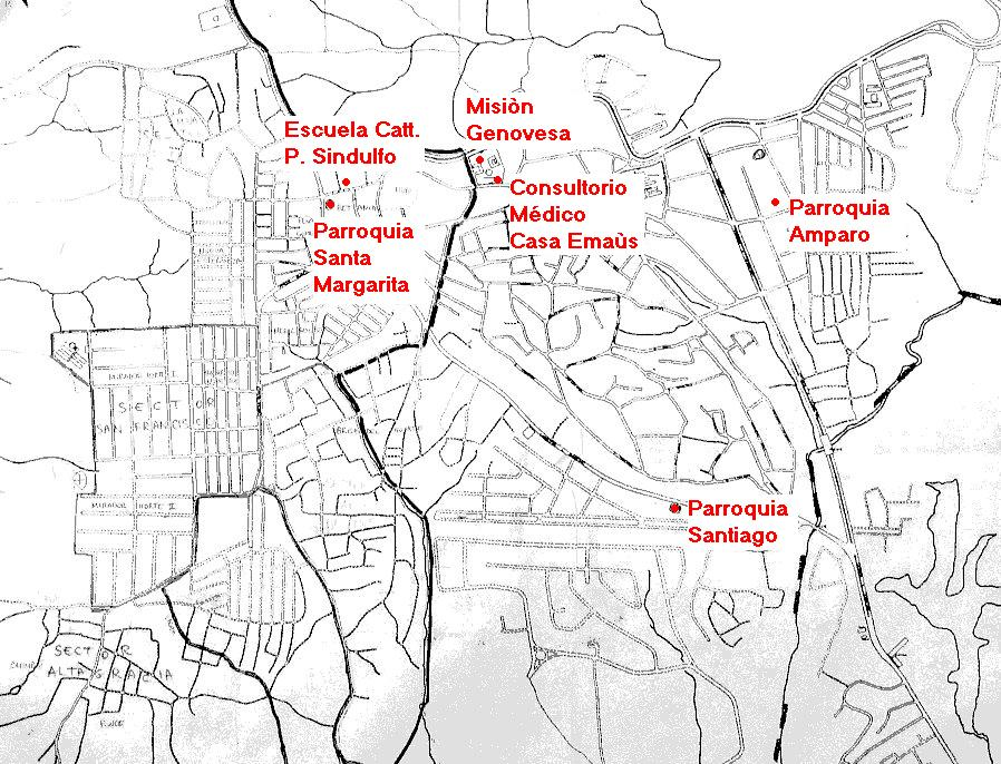 Missione genovese del Guaricano - Santo Domingo (Dominican Republic), pianta fotografica - Foto di Donpaolo